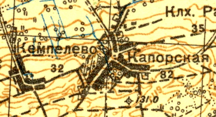 Топографическая карта Ленинградской области, квадрат О-35-12-Г (Ропша), деревня Кемпелево